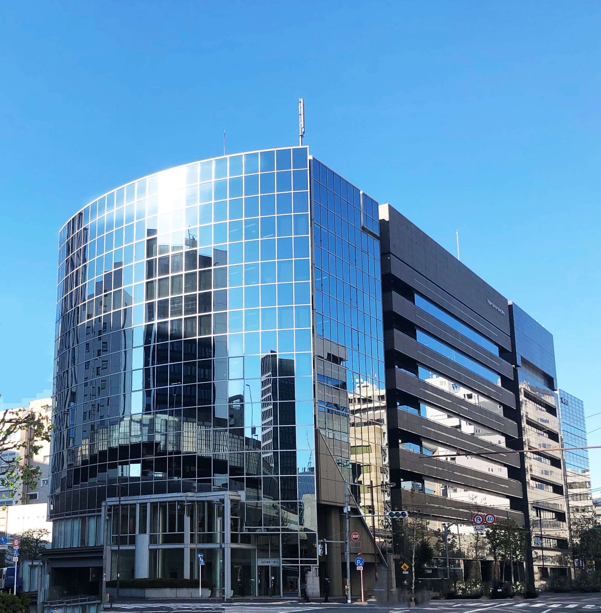 ミンカブ・ジ・インフォノイドが入居しているオフィスです。